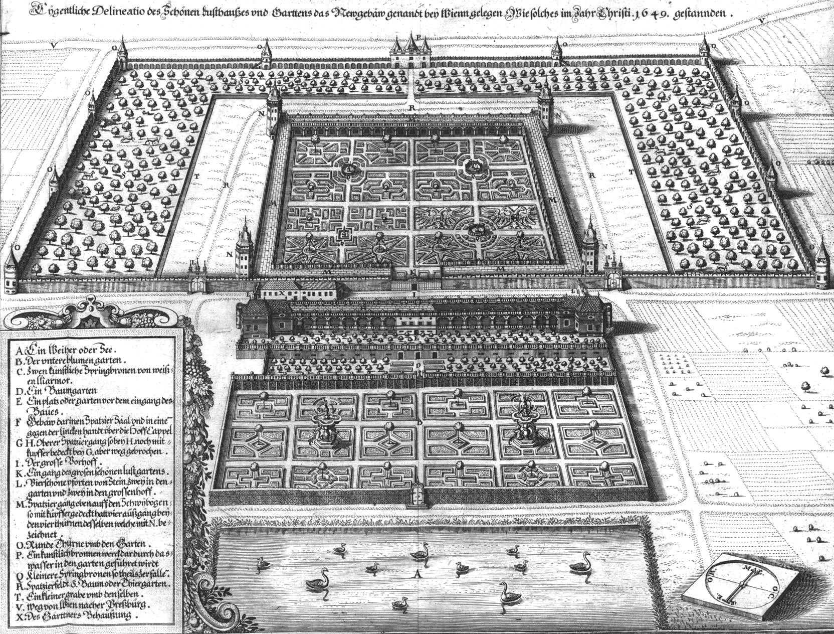 Eigentliche Delineatio des Schönen Lusthauses und Gartens des Newgebäuw genannt bey Wien gelegen. Wie solches im Jahr Christi 1649 gestannden. A. Ein Weiher oder See. B. Der untere Blumengarten. C. Zwei künstliche Springbrunnen von weißen Marmor. D. Ein Baumgarten. E. Ein Platz oder Garten vor dem Eingang des Baues. F. Gebäw darinen Spatzier Saal und in eine gegen der lincken Handt über die Hoff Cappel. G. H. Oberer Spatziergang ? H. noch mit kupfferbedeckten G. aber weggebrochen. I. Der grosse Vorhoff. K. Eingang des großen schönen Lustgartens. L. Vier schöne Pforten von Stein ? in den Garten und ? in den grossen Hoff. M. Spatziergang oben auf den Schw?bögen ? mit Kupfer gedeckt hatt vier ausgäng bei den vier Thürmen desselben welche mit N. bezeichnet. O. Runde Türme um den Garten. P. Ein künstlich Brunnenwerck dar durch das Wasser in den Garten geführet wird. Q. Kleinere Springbrunnen so theils zerfalle. R. Spatzierfeld S. Baum oder Thiergarten. T. Ein kleiner Graben umb denselben. V. Weg von Wien nach Pressburg. X. Des Gärttners Behausung.